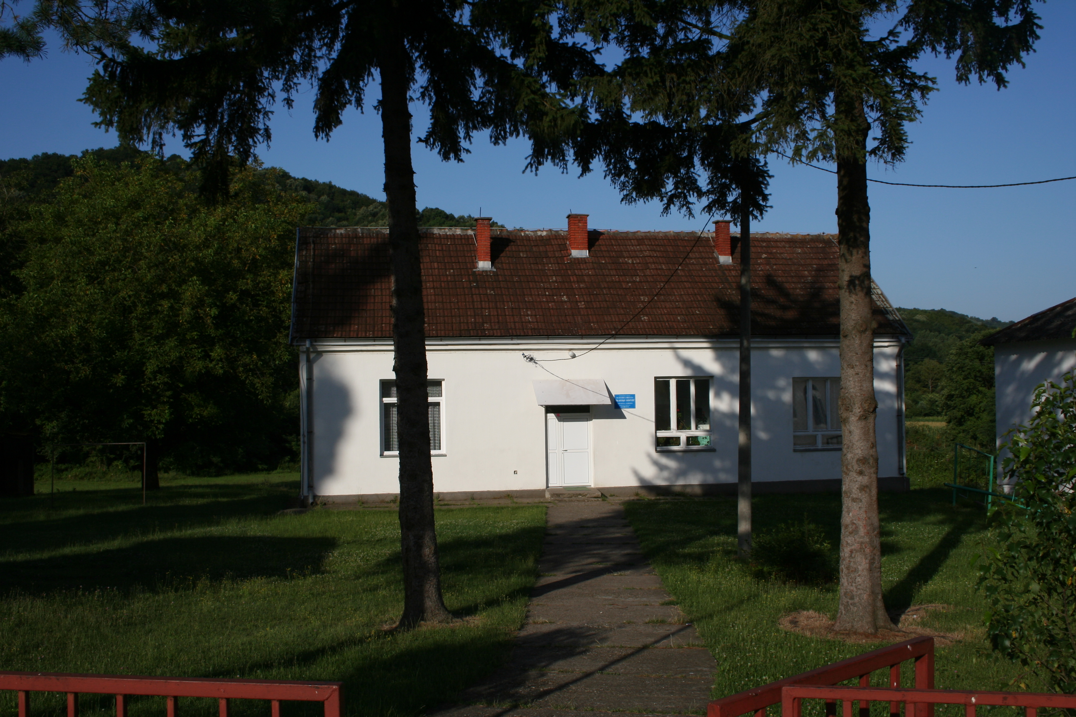 Zgrada seoske škole, Joševa